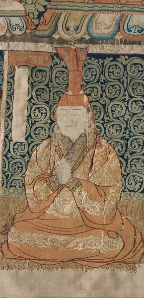 Монгол: Будшир хатан